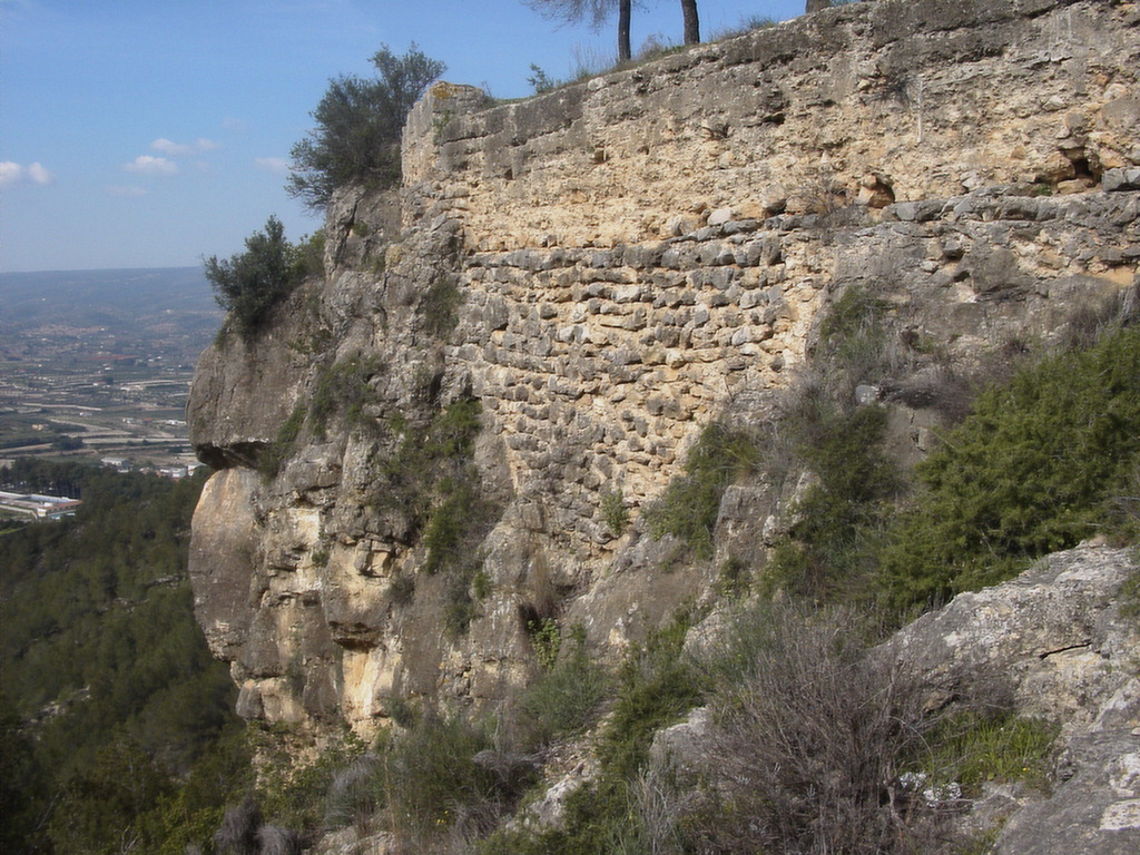 Lienzo de muralla construido con la técnica de la mampostería.